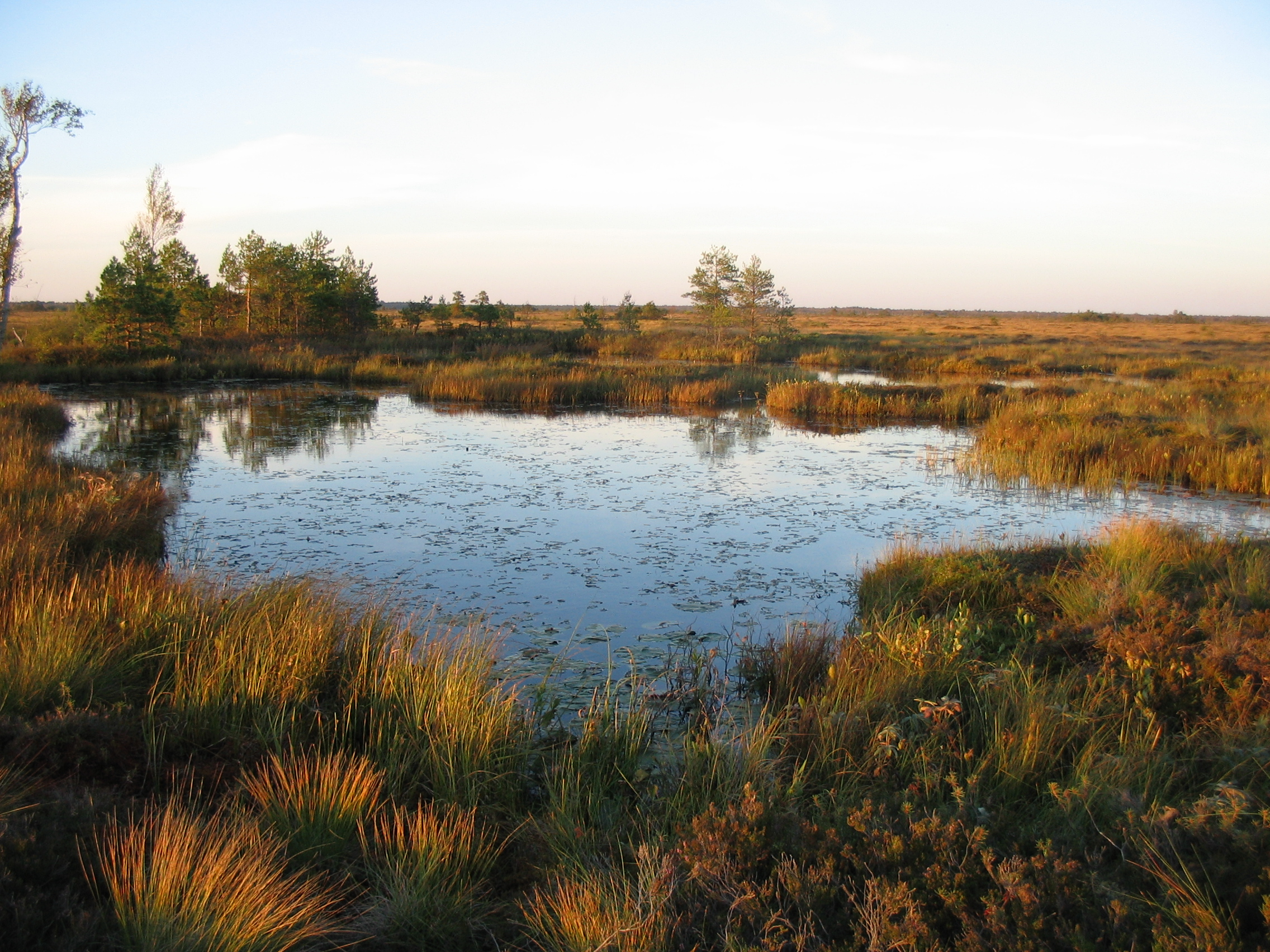 Lindude tõttu eutrofeerunud laugas Linnurabas